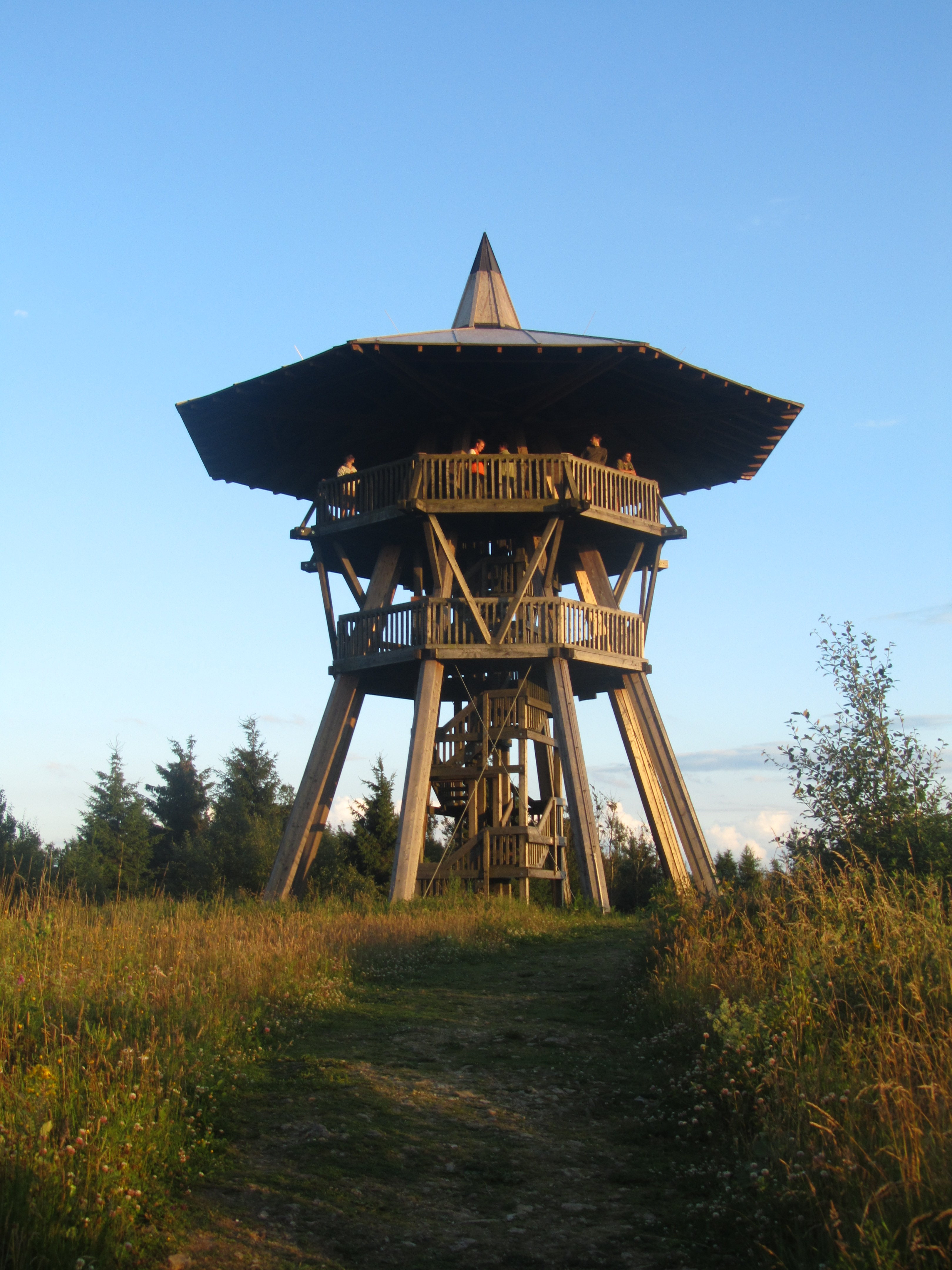 Der Eggeturm auf dem Velmerstot (468 m) im Eggegebirge nach der Renovierung im Jahr 2010.